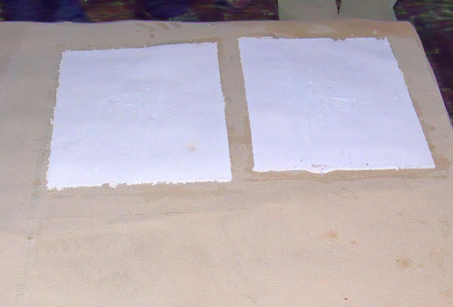 De Schoolmeester geschept papier met watermerk